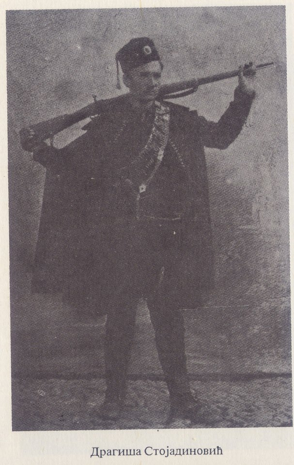 Драгиша Стоядинович